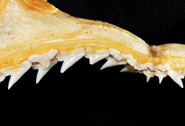 Sphyrna tudes